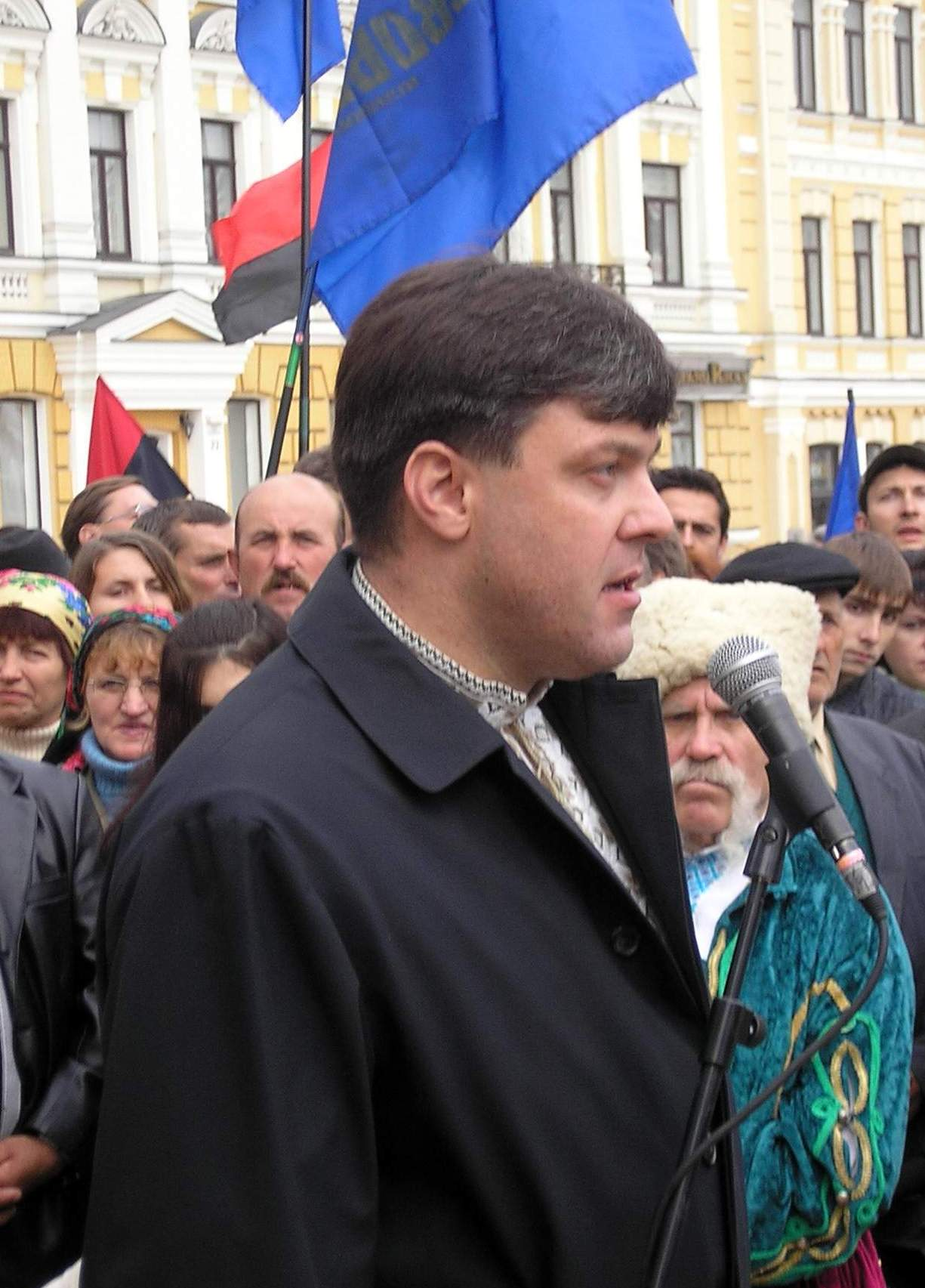 Лідер патрії "Свобода" Олег Тягнибок на заходах присвячених річниці УПА. Київ. 14 жовтня, 2006